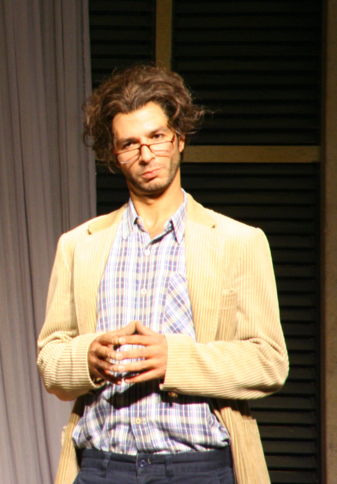 יוסי עיני כדוקטור עיני בהצגה אושר